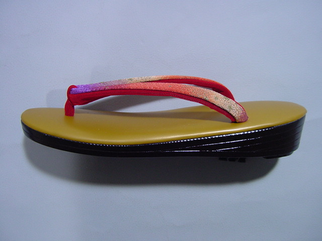 Zori de femme, de visite (assez informel).